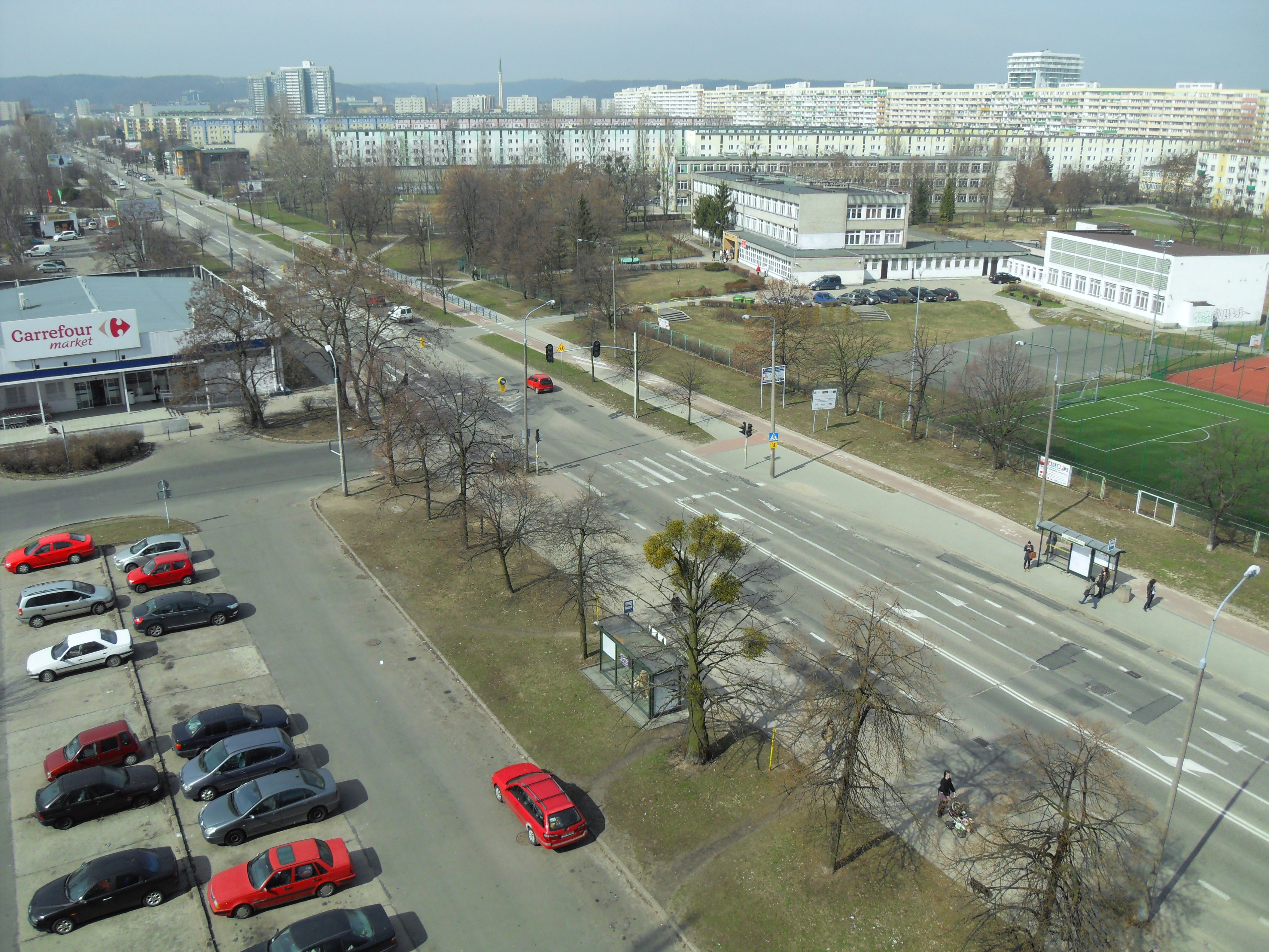 Gdańsk Przymorze Wielkie, ul. Kołobrzeska. Obszar historyczny Biały Dwór.